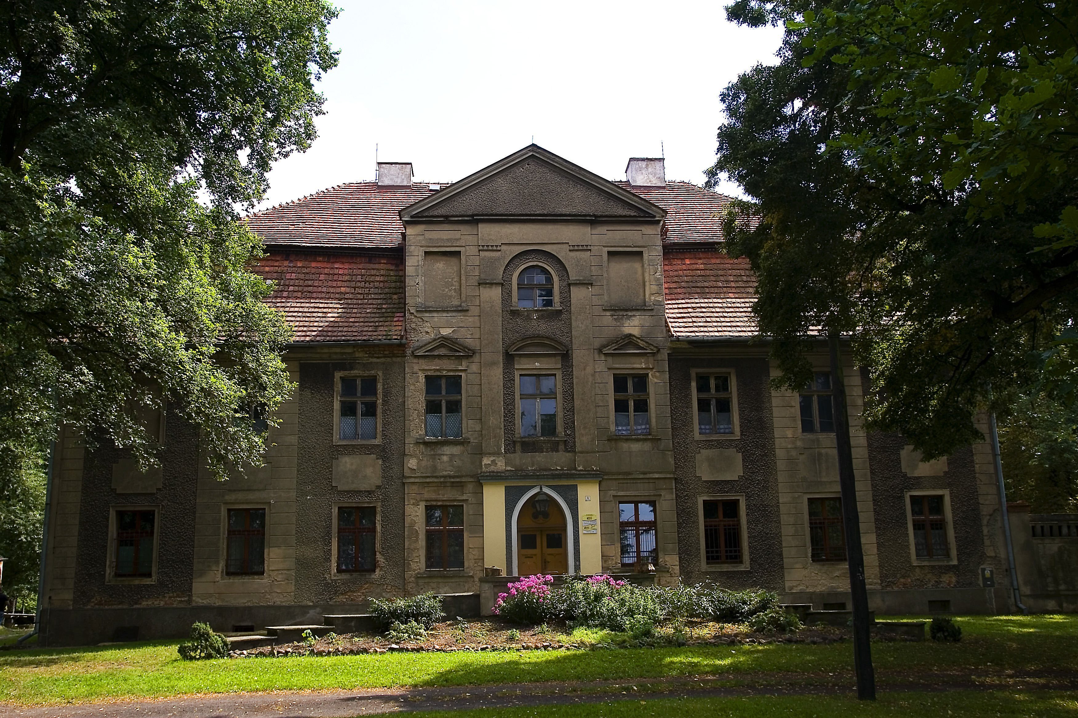 Gołkowice, pałac, XVIII - XIX w. Gmina Byczyna, powiat kluczborski 05.1965.